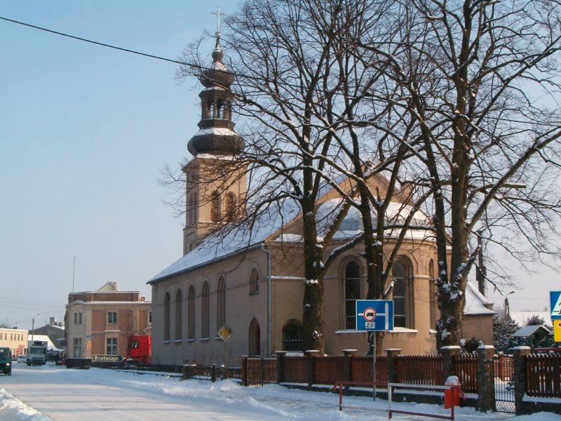 Polska, woj. wielkopolskie, Dobrzyca, Kościół poewangelicki, późnoklasycystyczny (lata 30. XIX wieku), murowany, znajdujący się w Dobrzycy, powiat pleszewski, woj. Wielkopolskie u zbiegu ulic Koźmińskiej i Krotoszyńskiej.